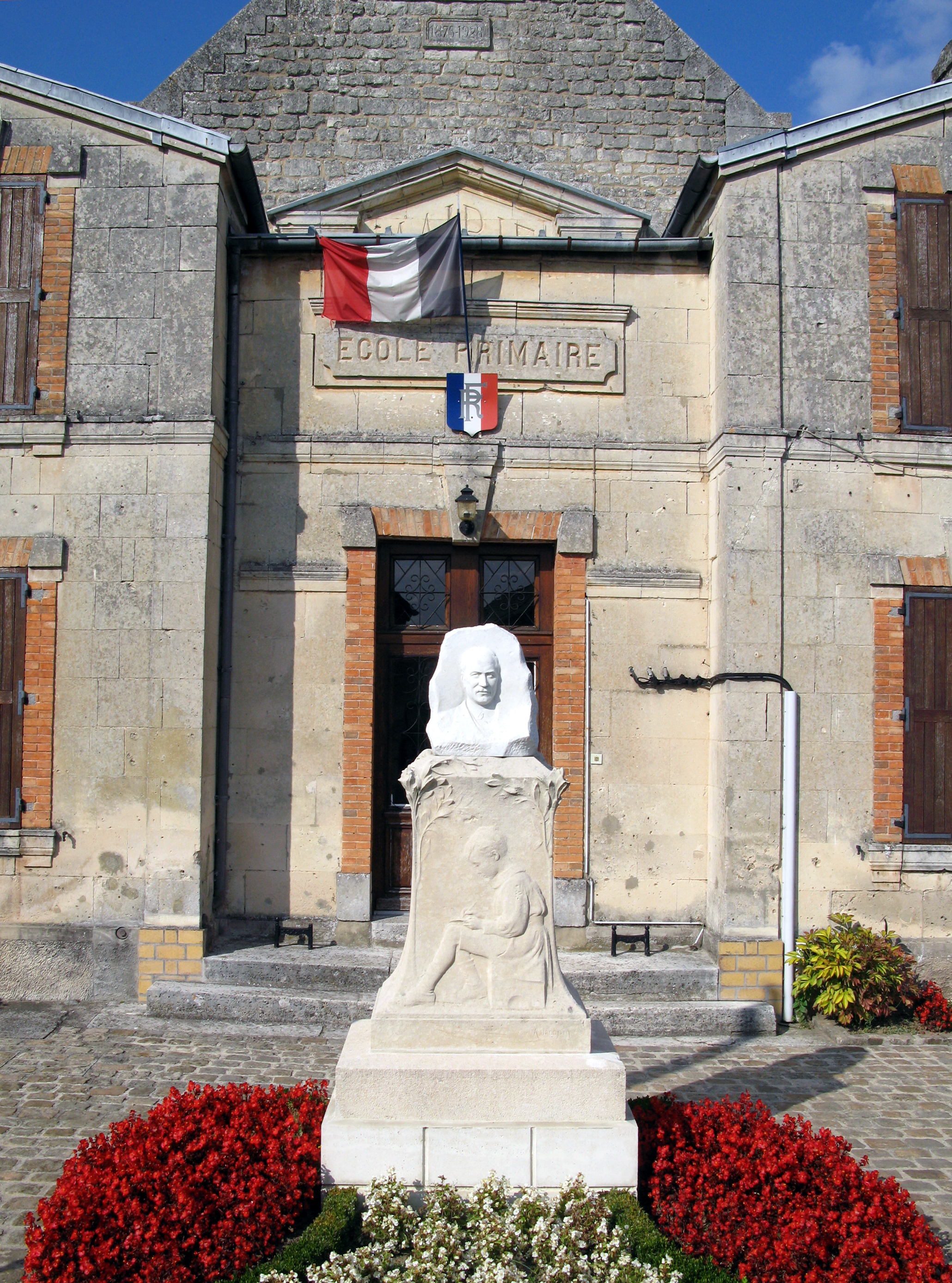 Dampleux (Aisne, France) - La mairie. Le monument devant l'entrée a été érigé en mémoire de Émile Lupette. .